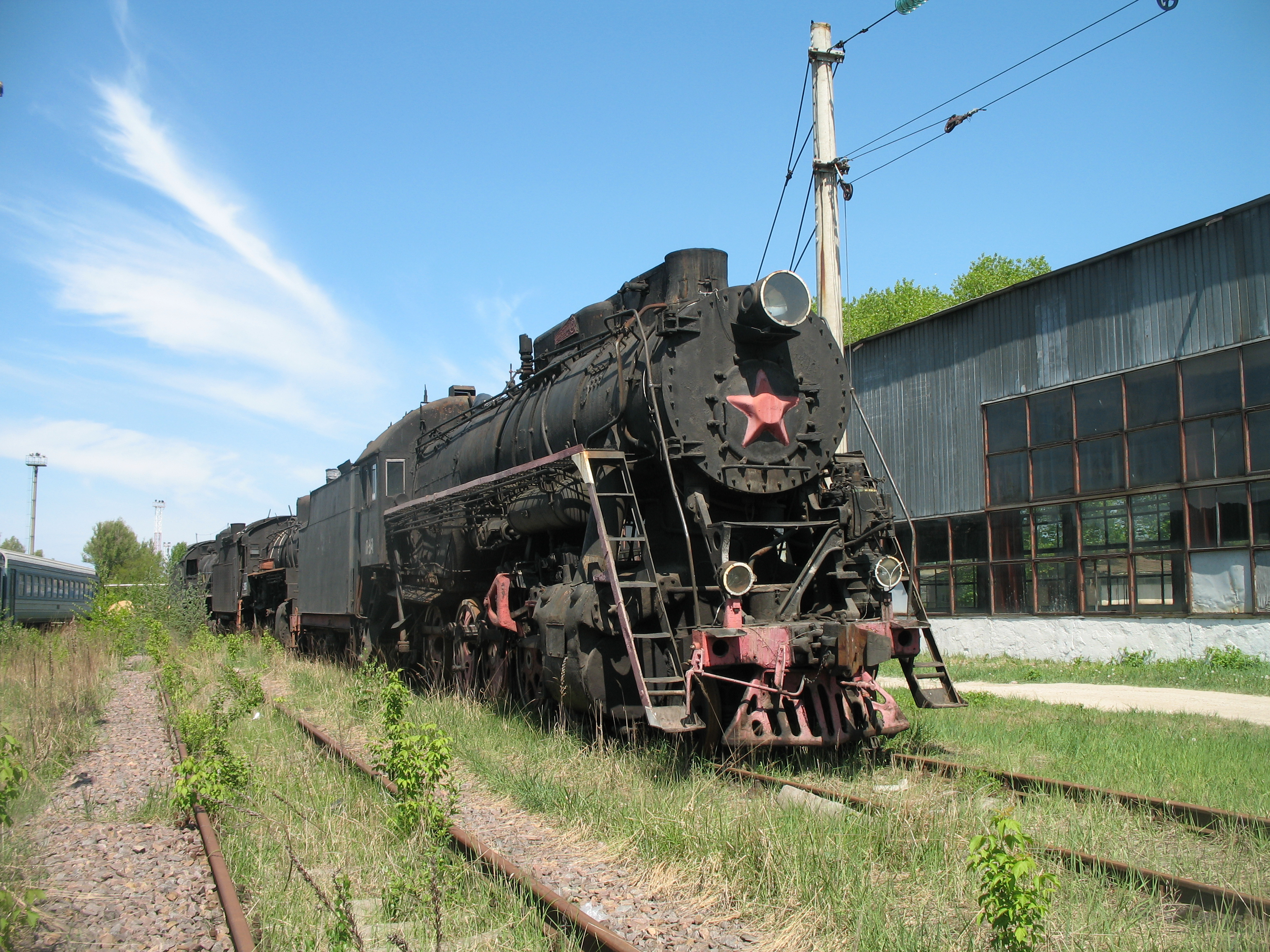 Паровоз Л-5141 в локомотивном депо Тернополь